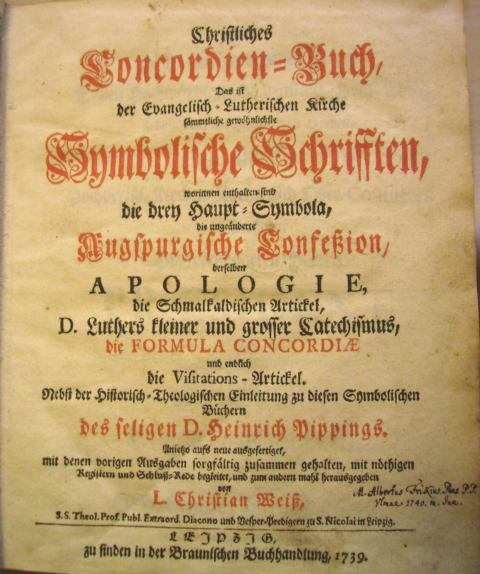 Titelblatt aus dem Concordienbuch des Chr. Weiss 1739 Exemplar ist im Besitz des Fotografen